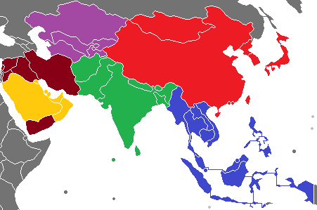 亚洲篮球协会